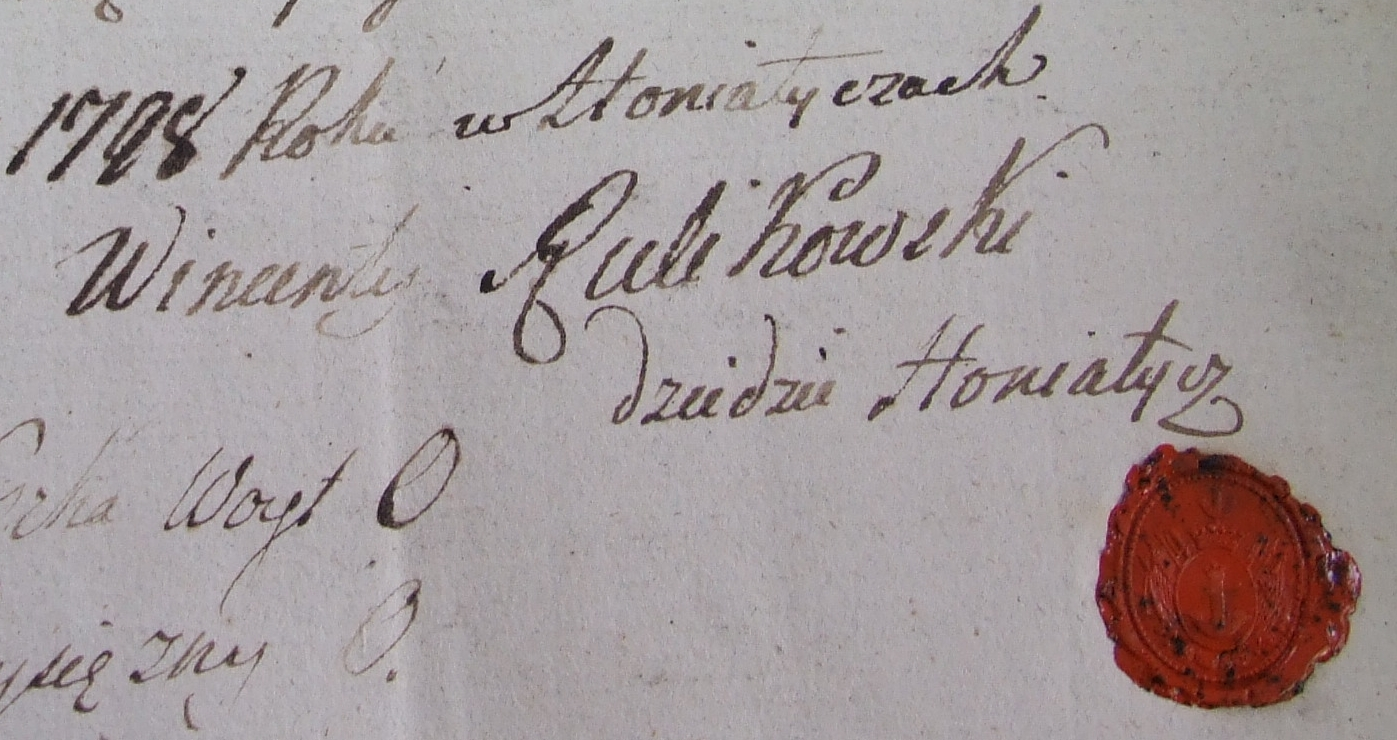 Podpis Wincentego Rulikowskiego na dokumencie z 1798 roku